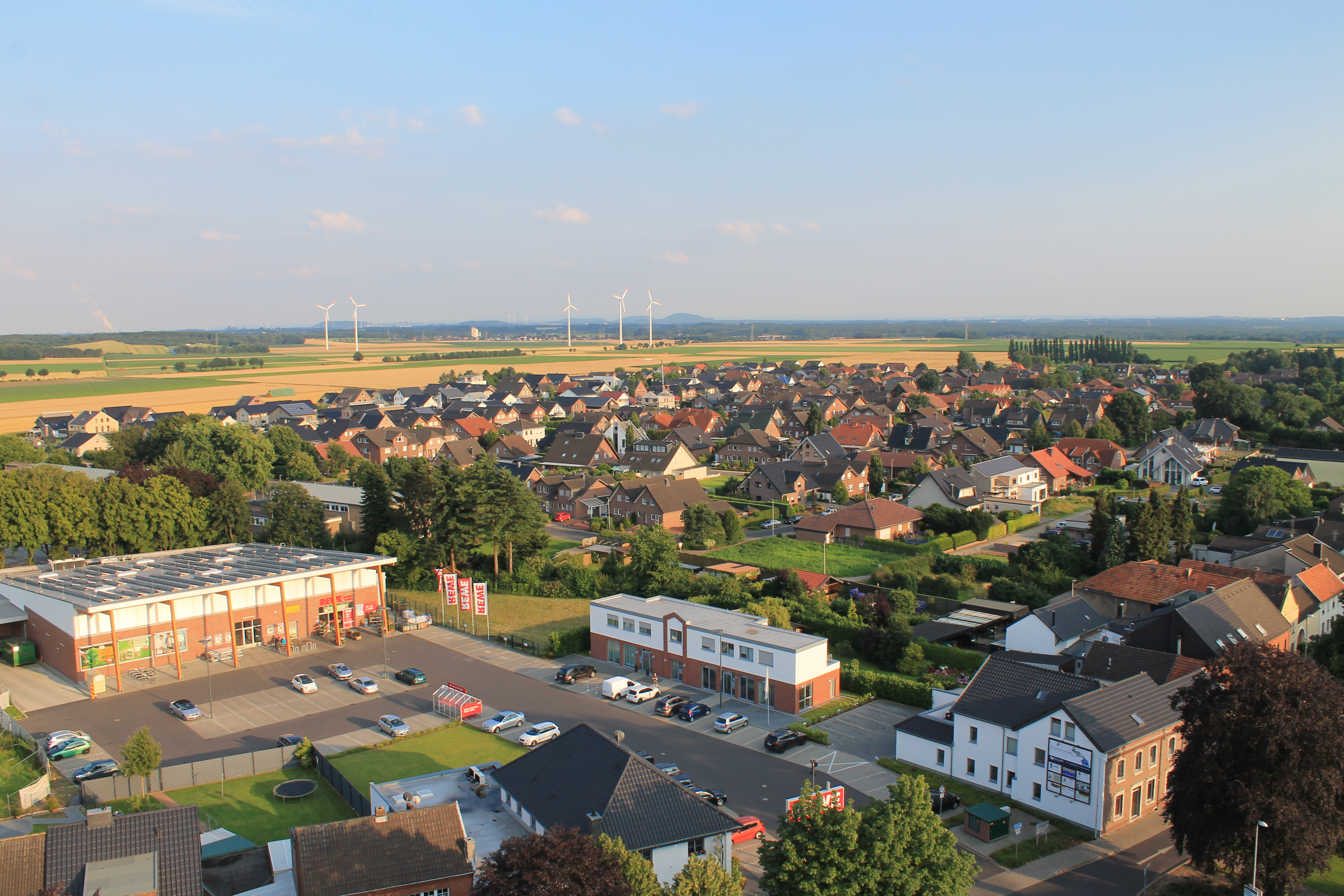 Ein Teil von Birgden (Süd-Ost). Stand: 2016